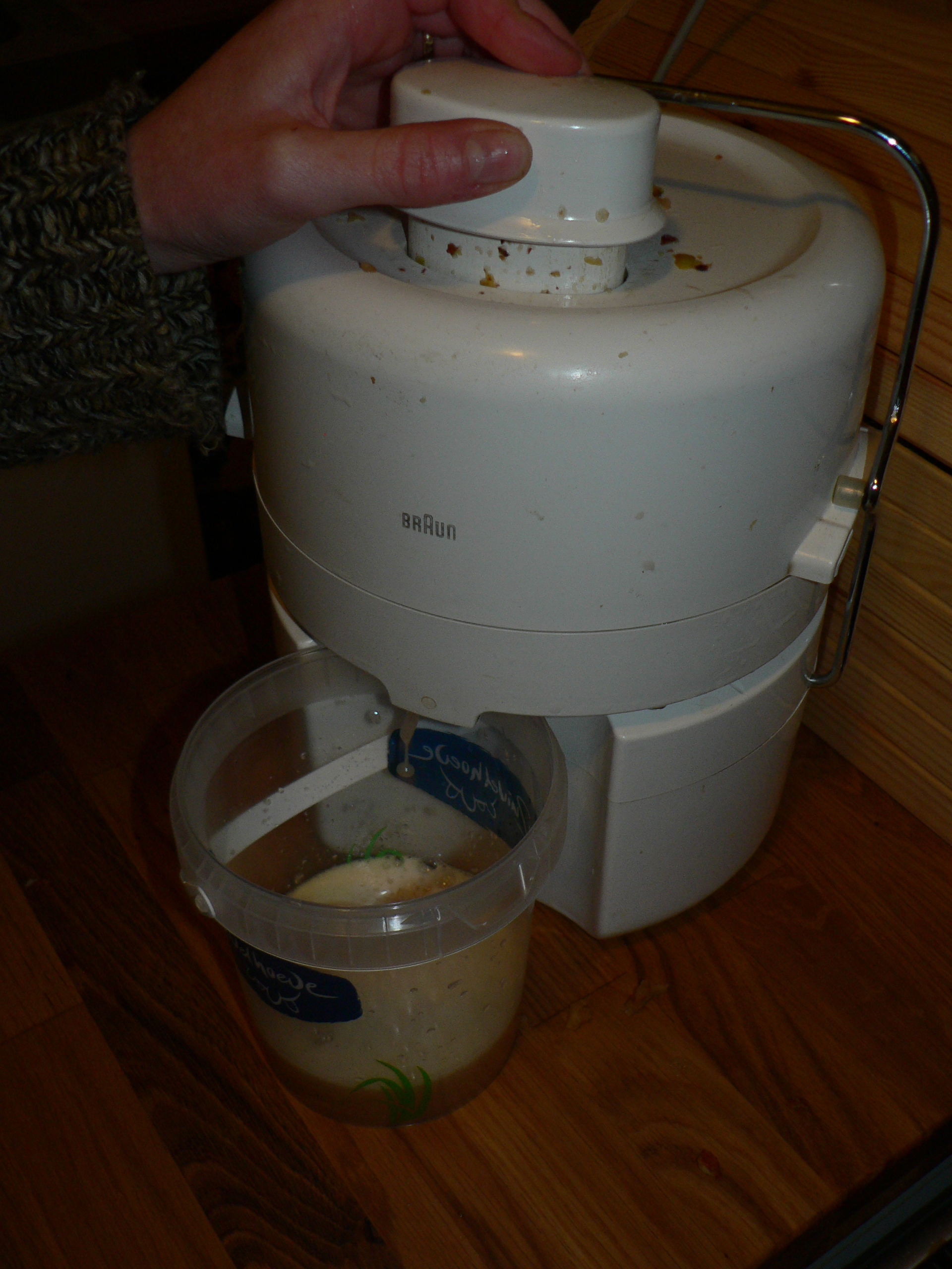 juice centrifuge